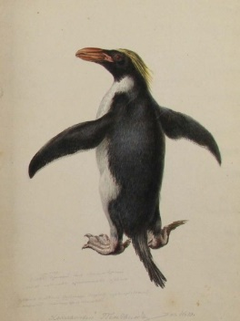 Михайлов Павел Николаевич - Хохлатый пингвин